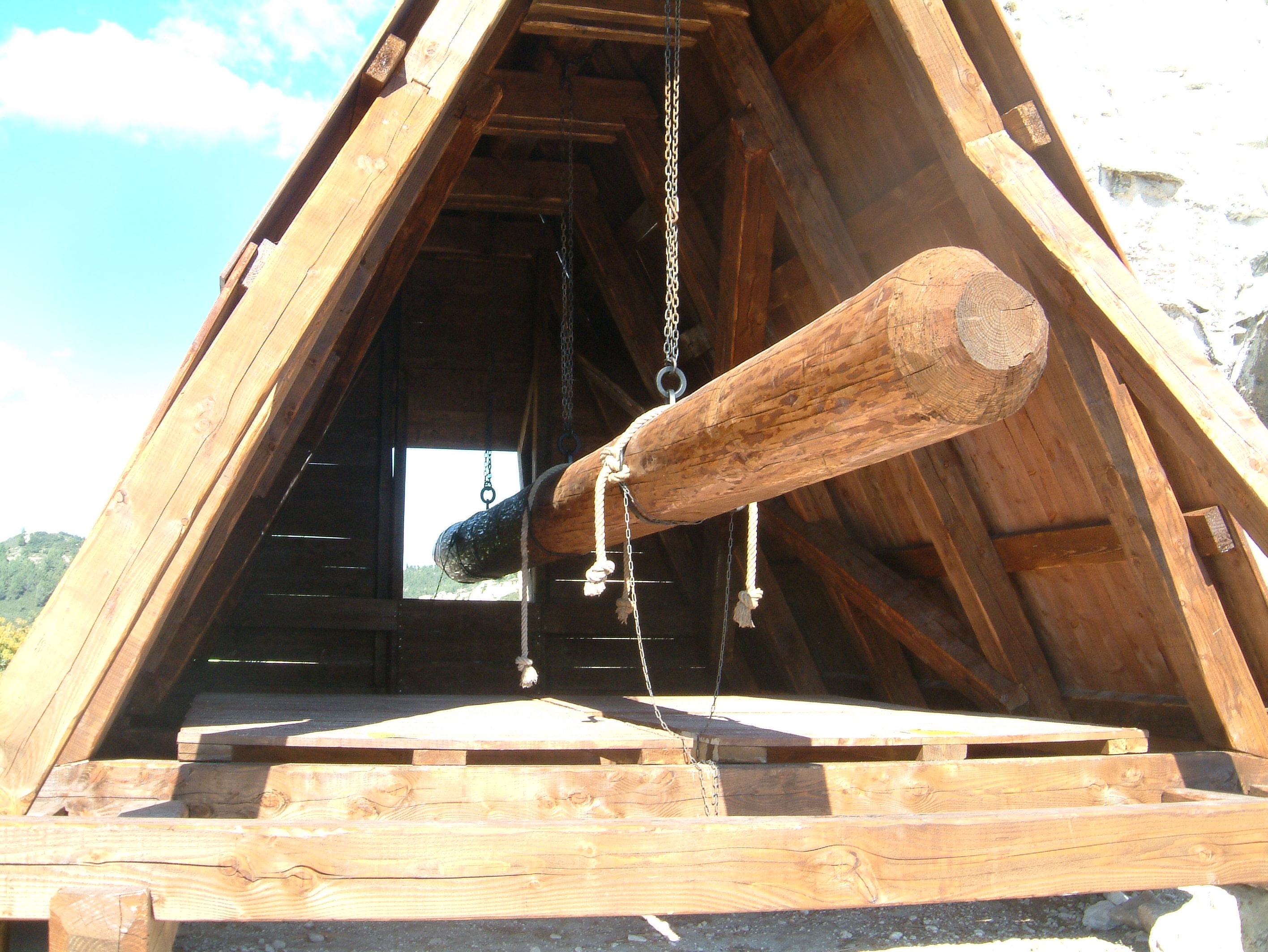 Nachbau eines Rammbocks, Zitadelle Les-Baux-de-Provence.